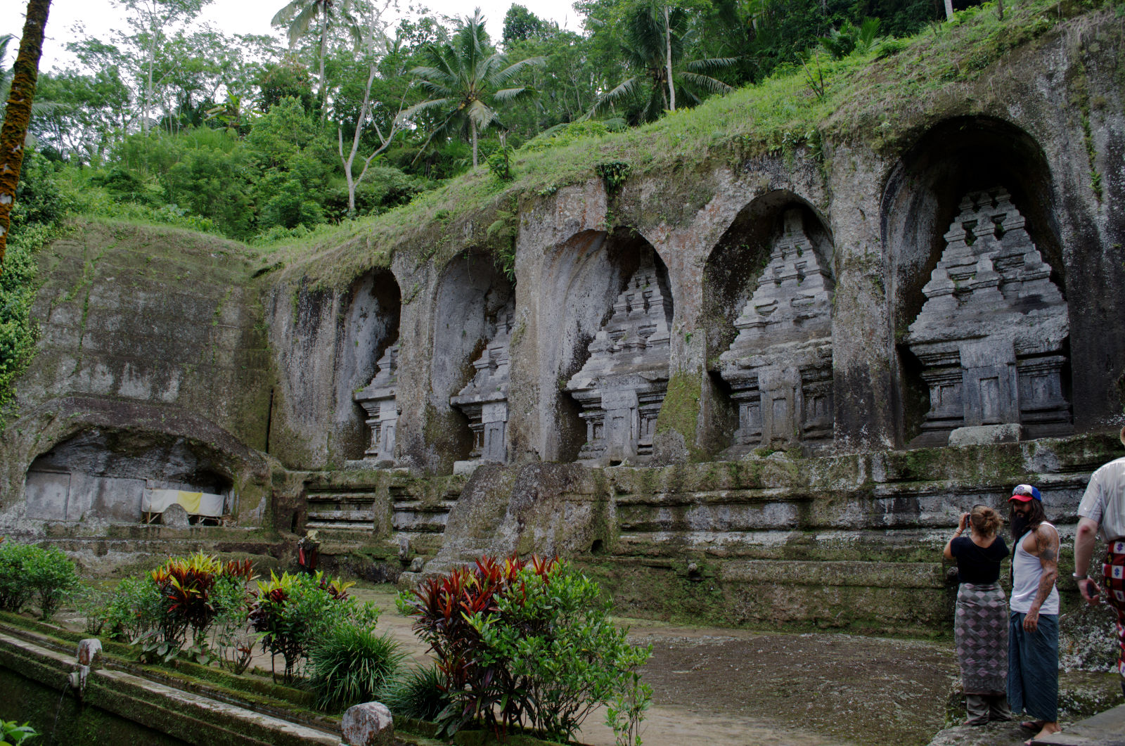 Manukaya, Tampaksiring, Gianyar, Bali, Indonesia